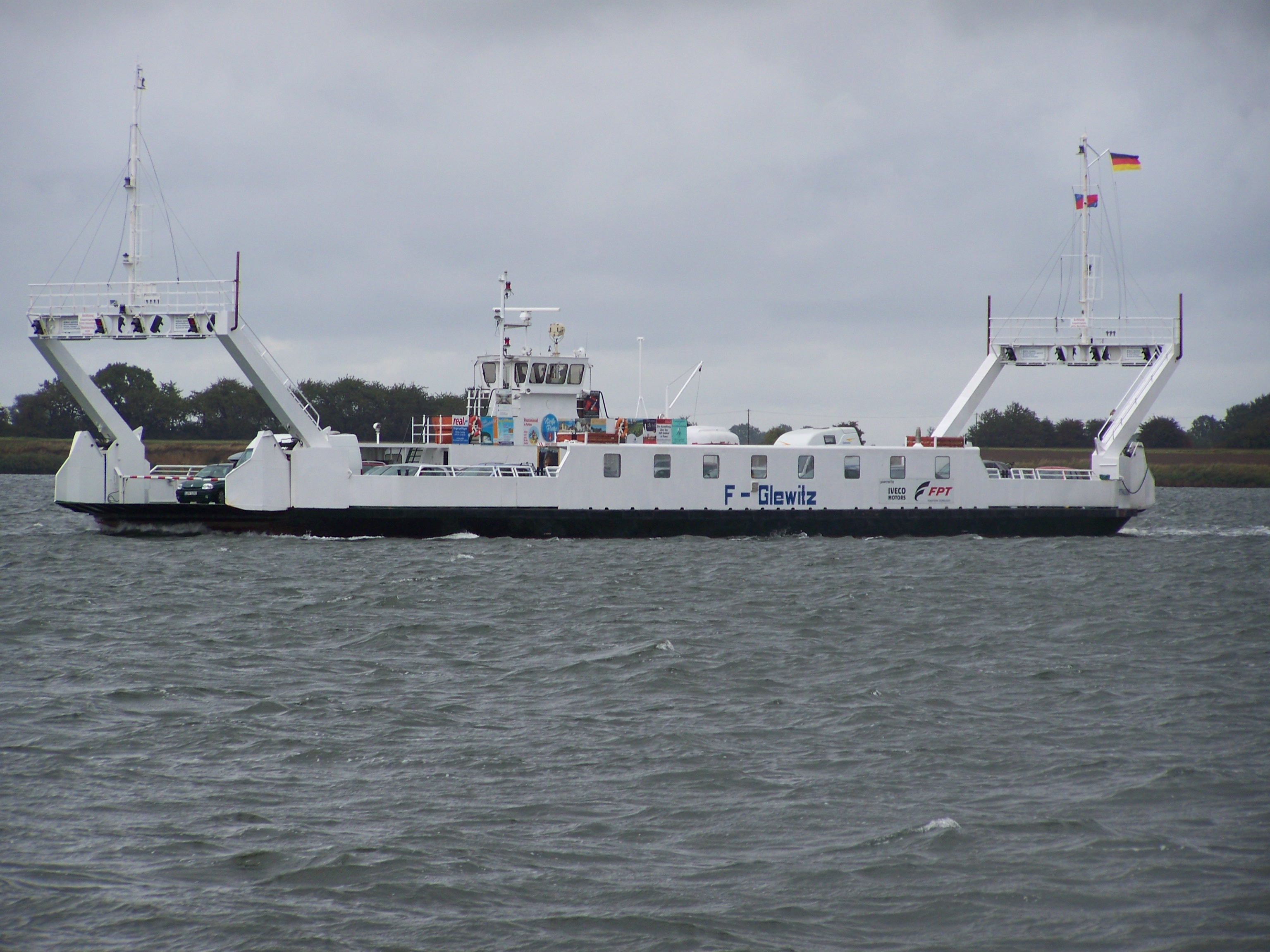 Fährschiff_Stahlbrode_Glewitz_(2009-09-13)